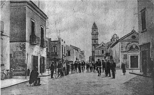 Corso de Marinis - 1930. Sulla destra è visibile un angolo del Palazzo del Principe e la cappella originale intitolata a San'Antonio di Padova (due costruzioni ormai distrutte). In fondo si vede l'attuale chiesa di Sant'Antonio di Padova.